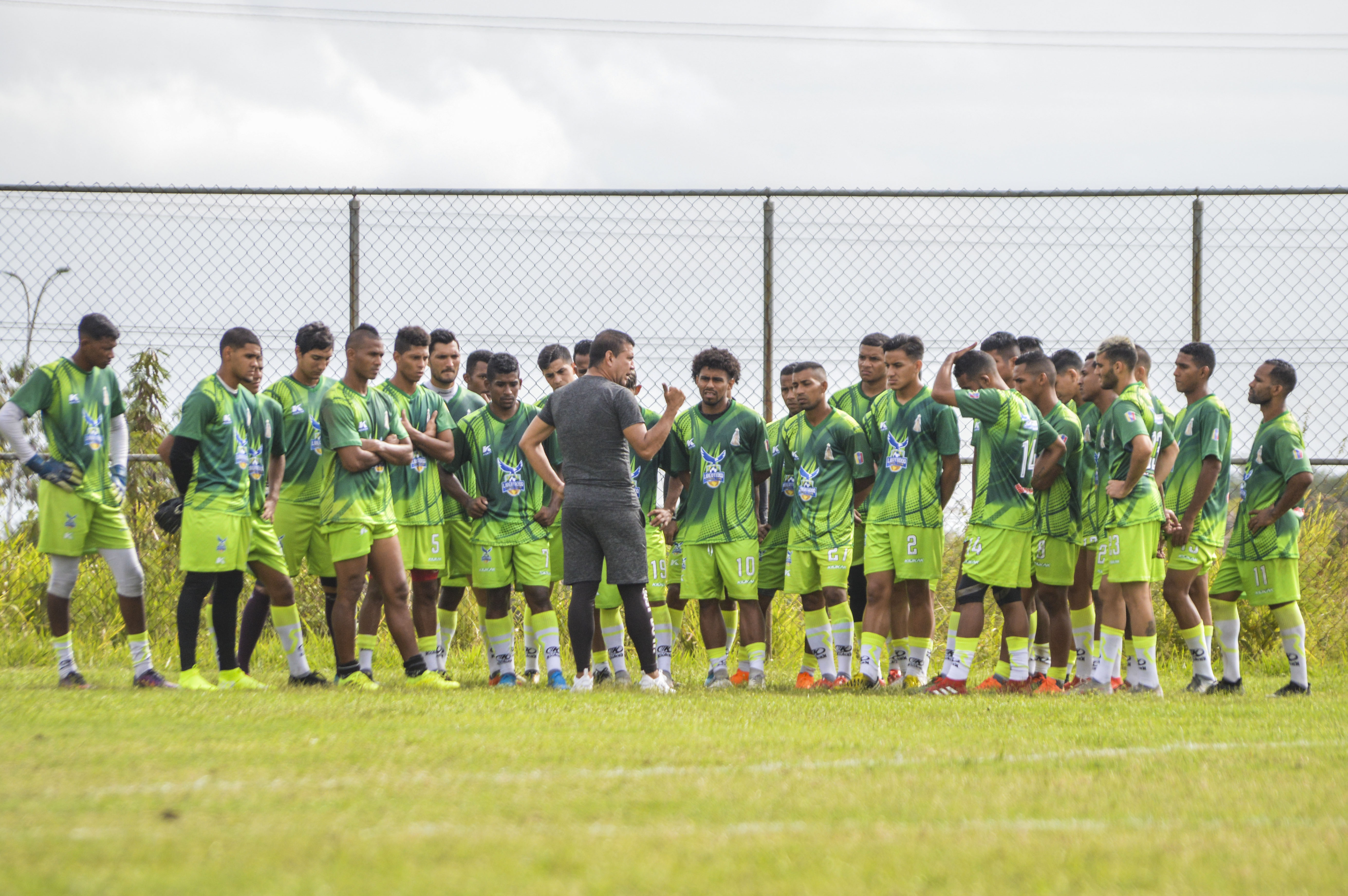 Pre Temporada - Torneo de Apertura 2020